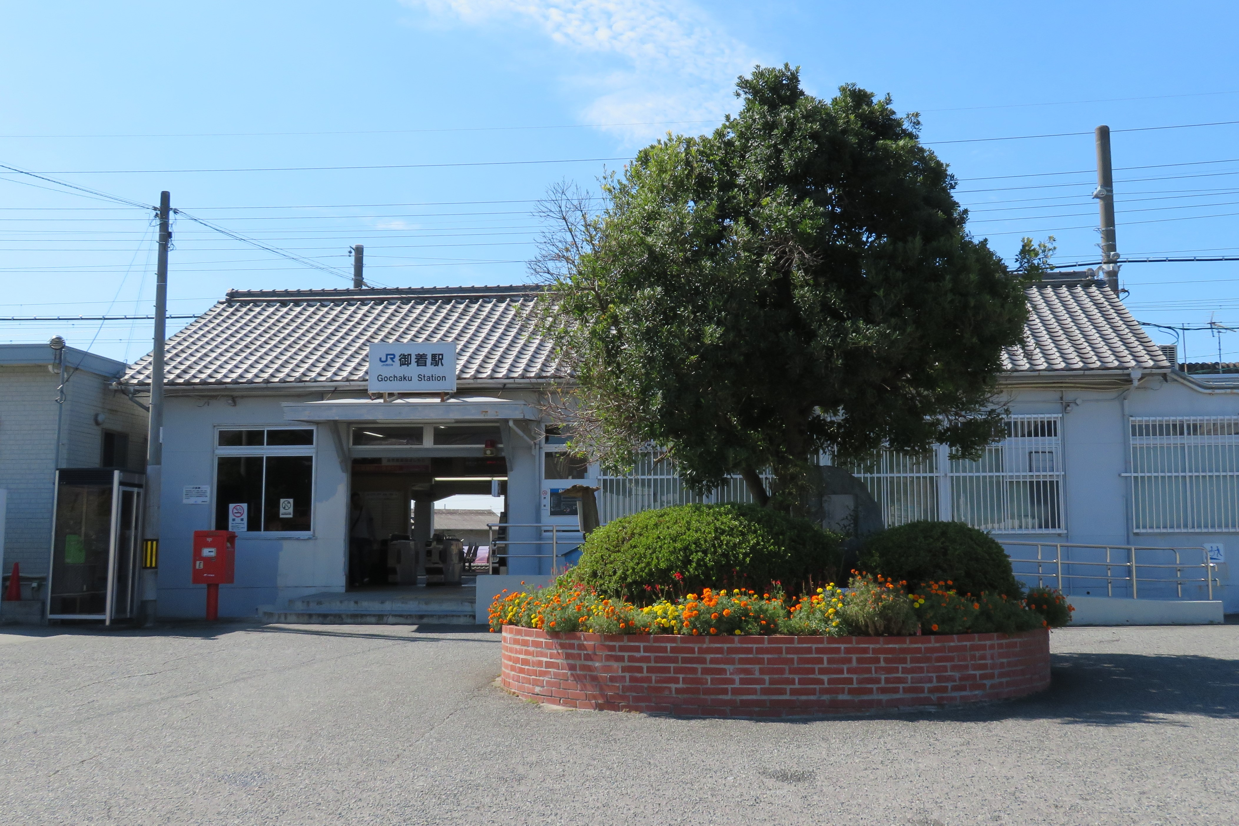 JR西日本御着駅